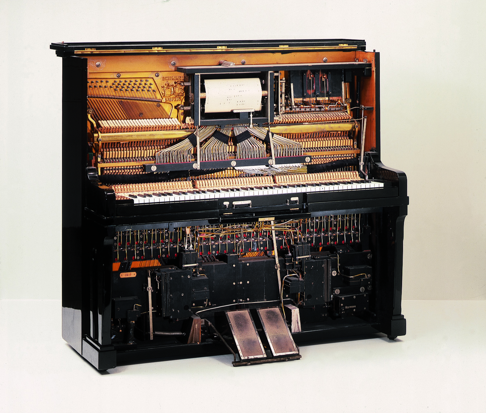 Selbstspielendes Schimmel Klavier, Ducanola